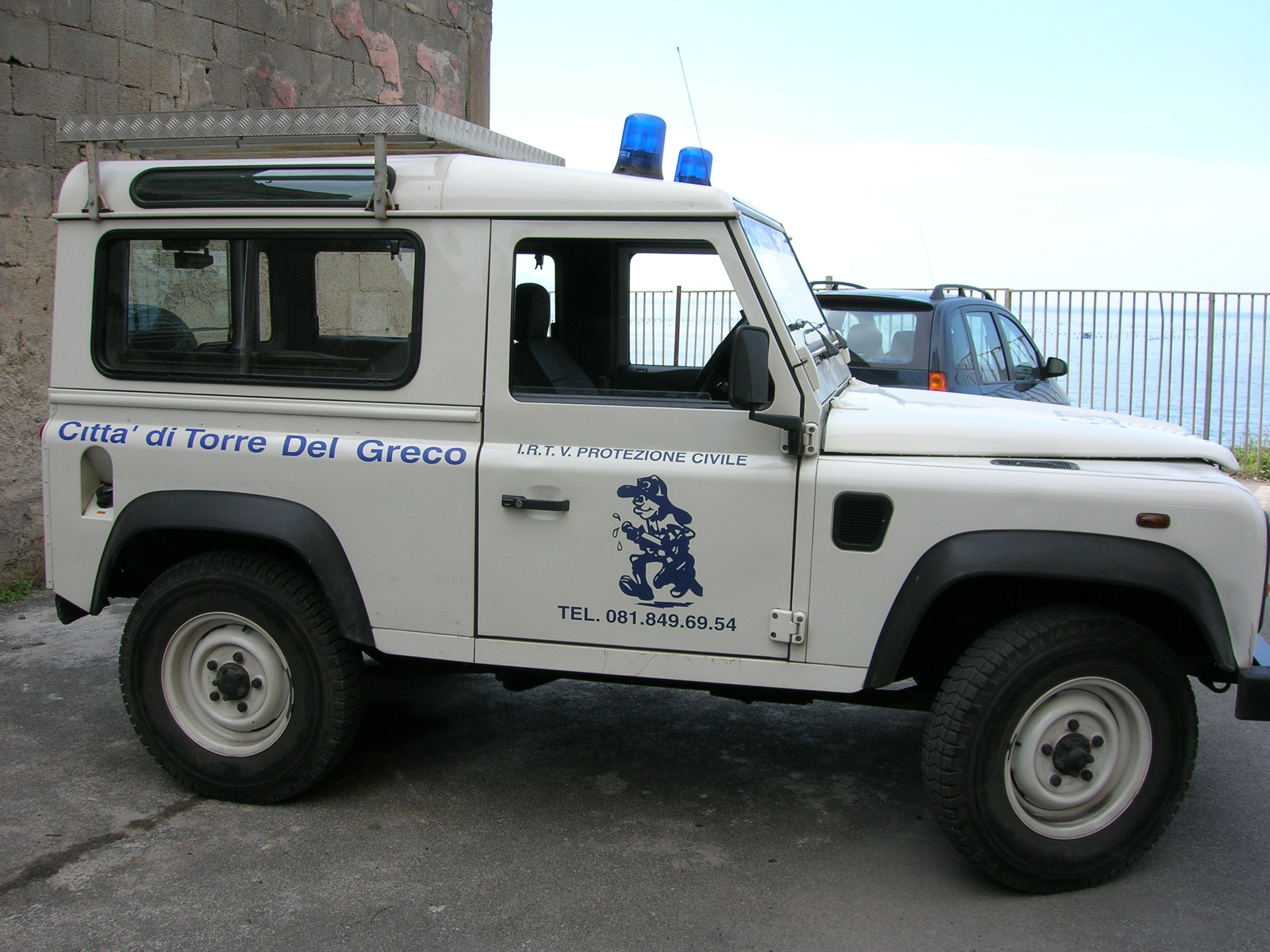 macchina utilizzata dalla Protezione Civile